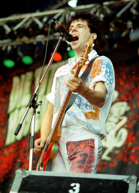 Andreas Meurer, Bassist/Sänger der Toten Hosen, bei einem Konzert 1987 in Garching bei München.